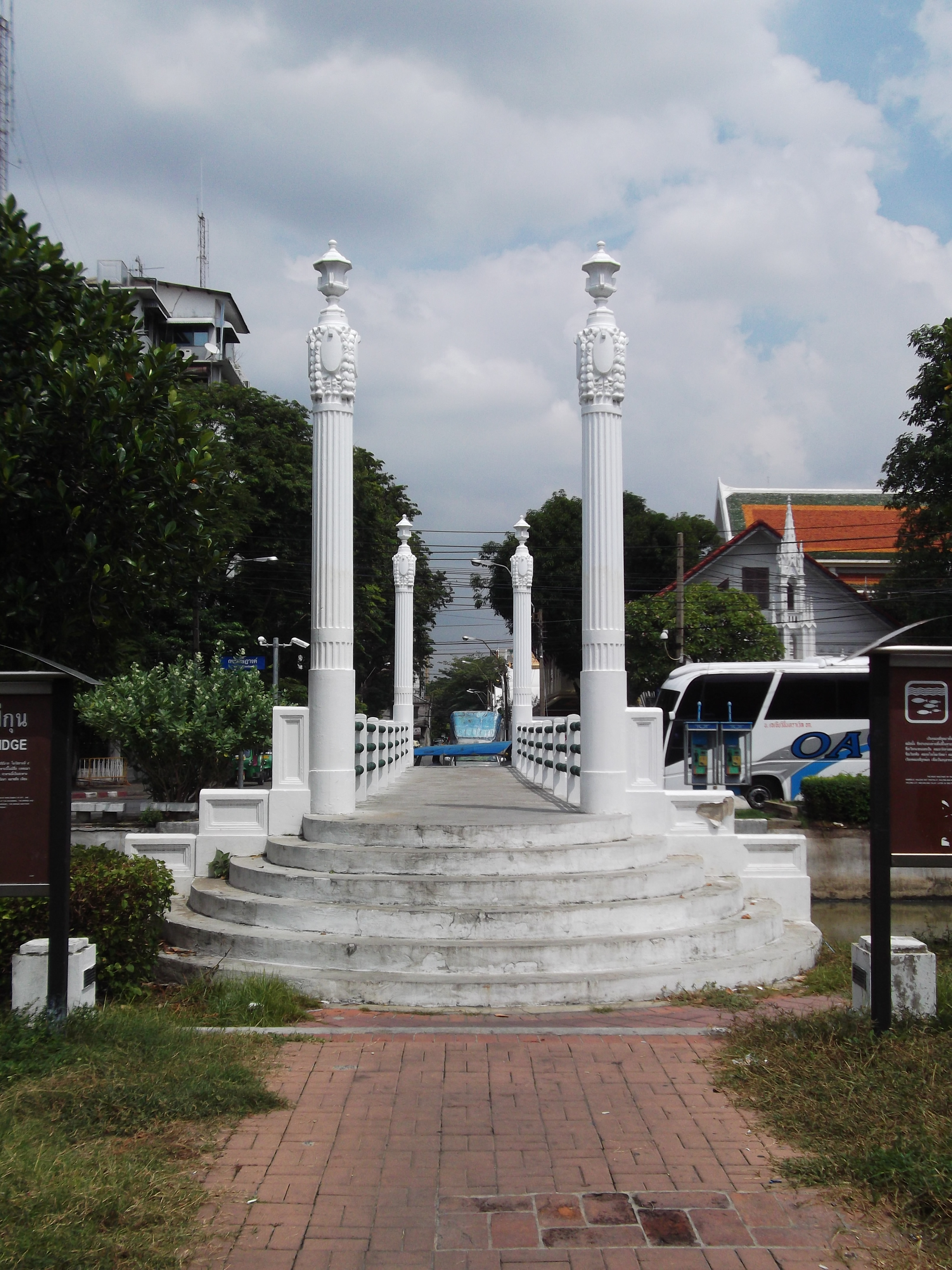 สะพานปีกุน